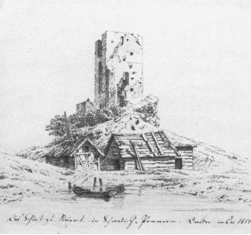 Die Schlossruine von Wolgast; Federzeichnung von Caspar David Friedrich (1774-1840); ausgestellt im Puschkin-Museum Moskau (Inv.-Nr. 13433)